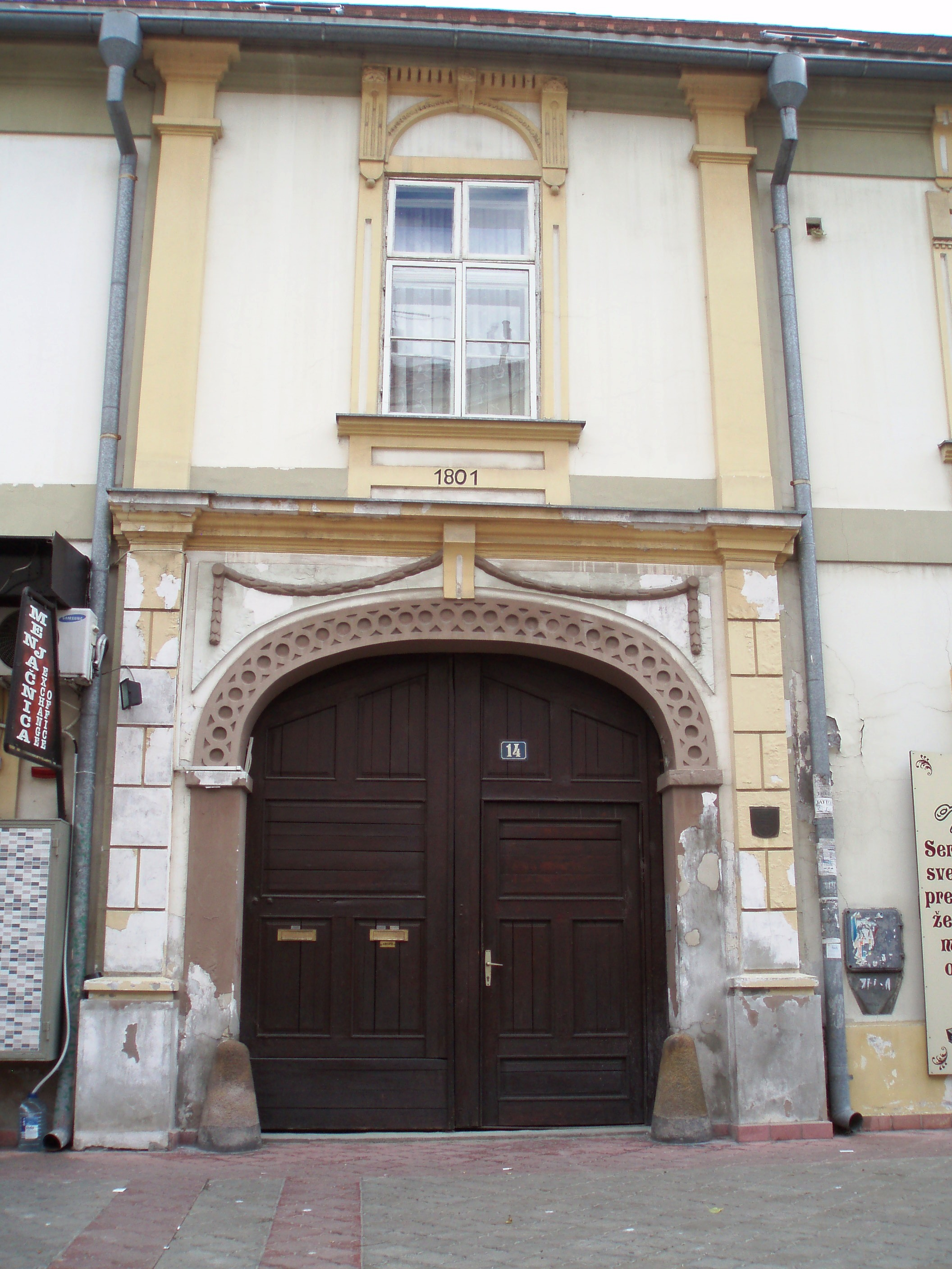 Kuća porodice Marković, glavni ulaz iz Gospodske ulice, autor fotografije: Nicolo